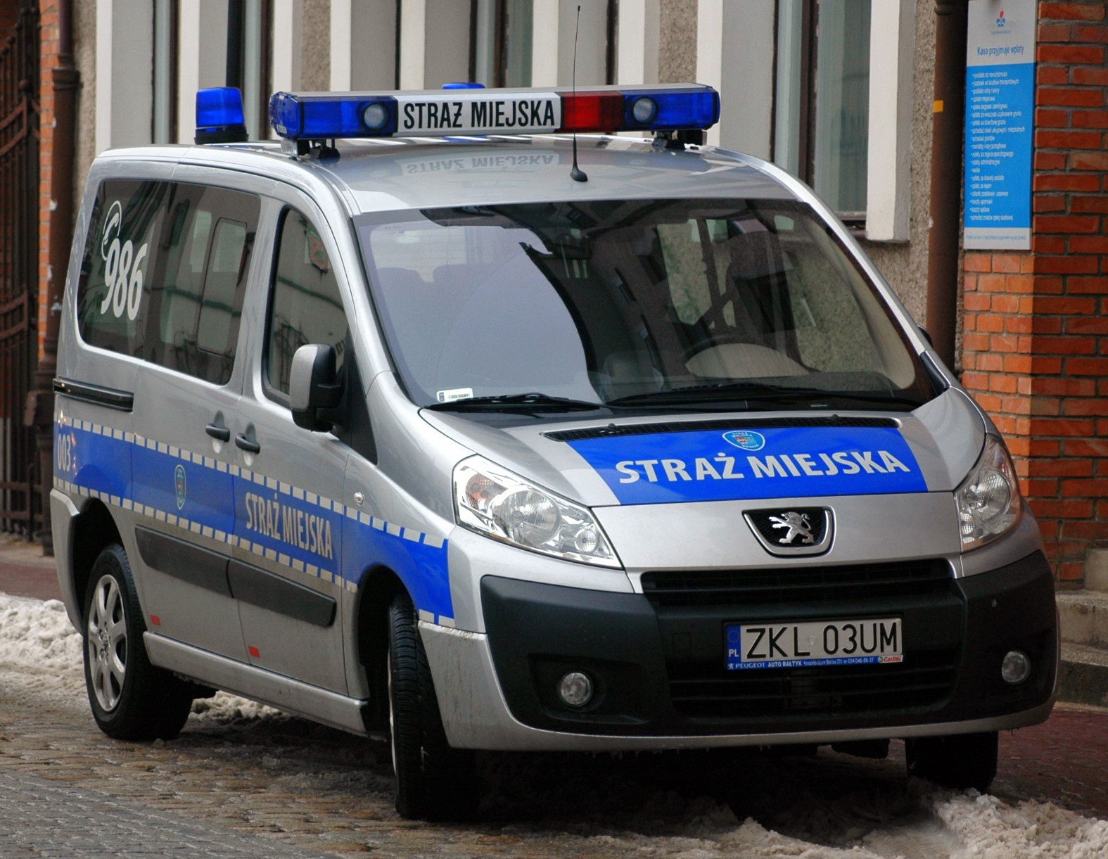 Samochód straży miejskiej w Kołobrzegu.